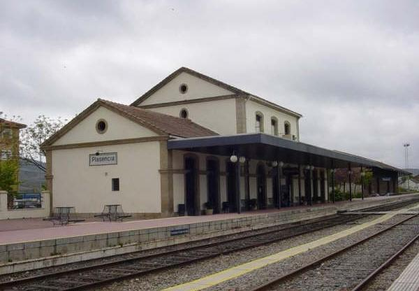 Fotografía de la estación de tren de Plasencia